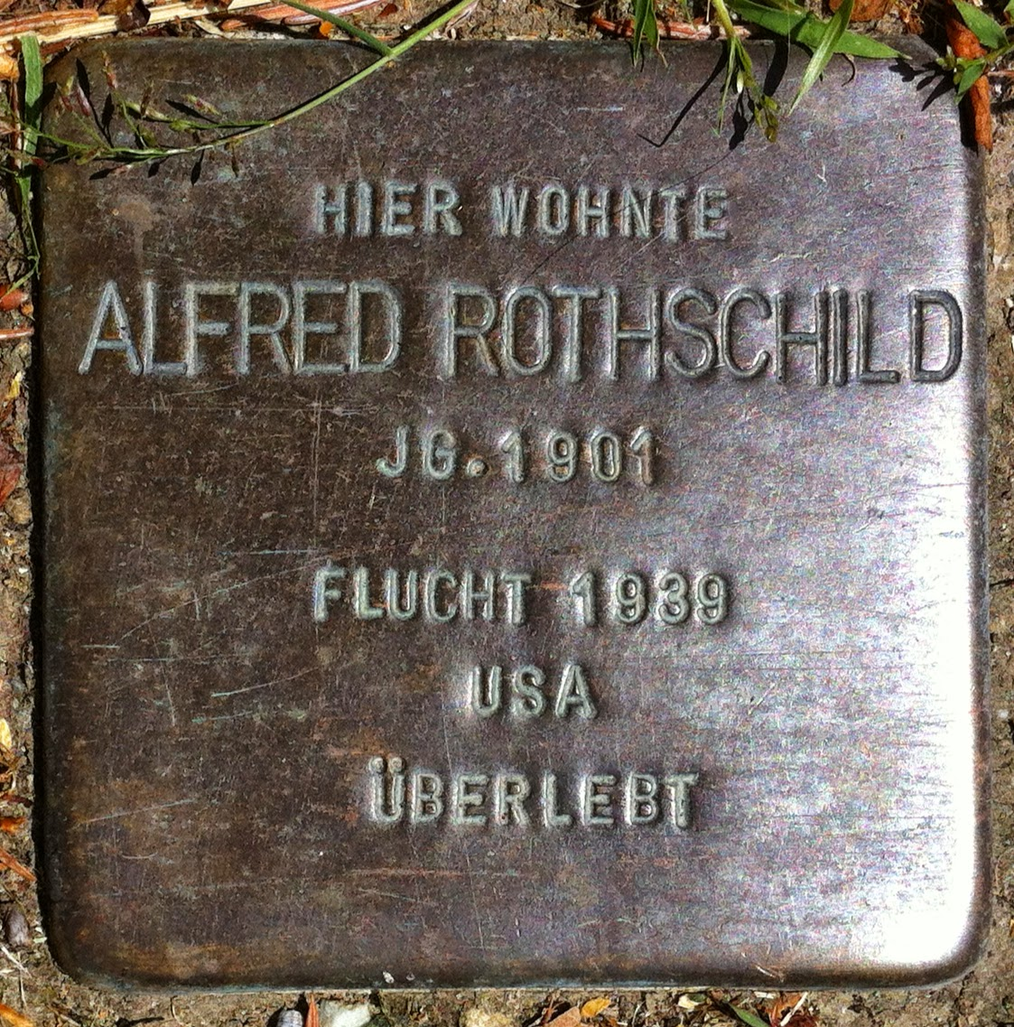 Deutschland (D) - Baden-Württemberg (BW) - Landkreis Konstanz (KN) - Stockach: Stolperstein "Alfred Rothschild"